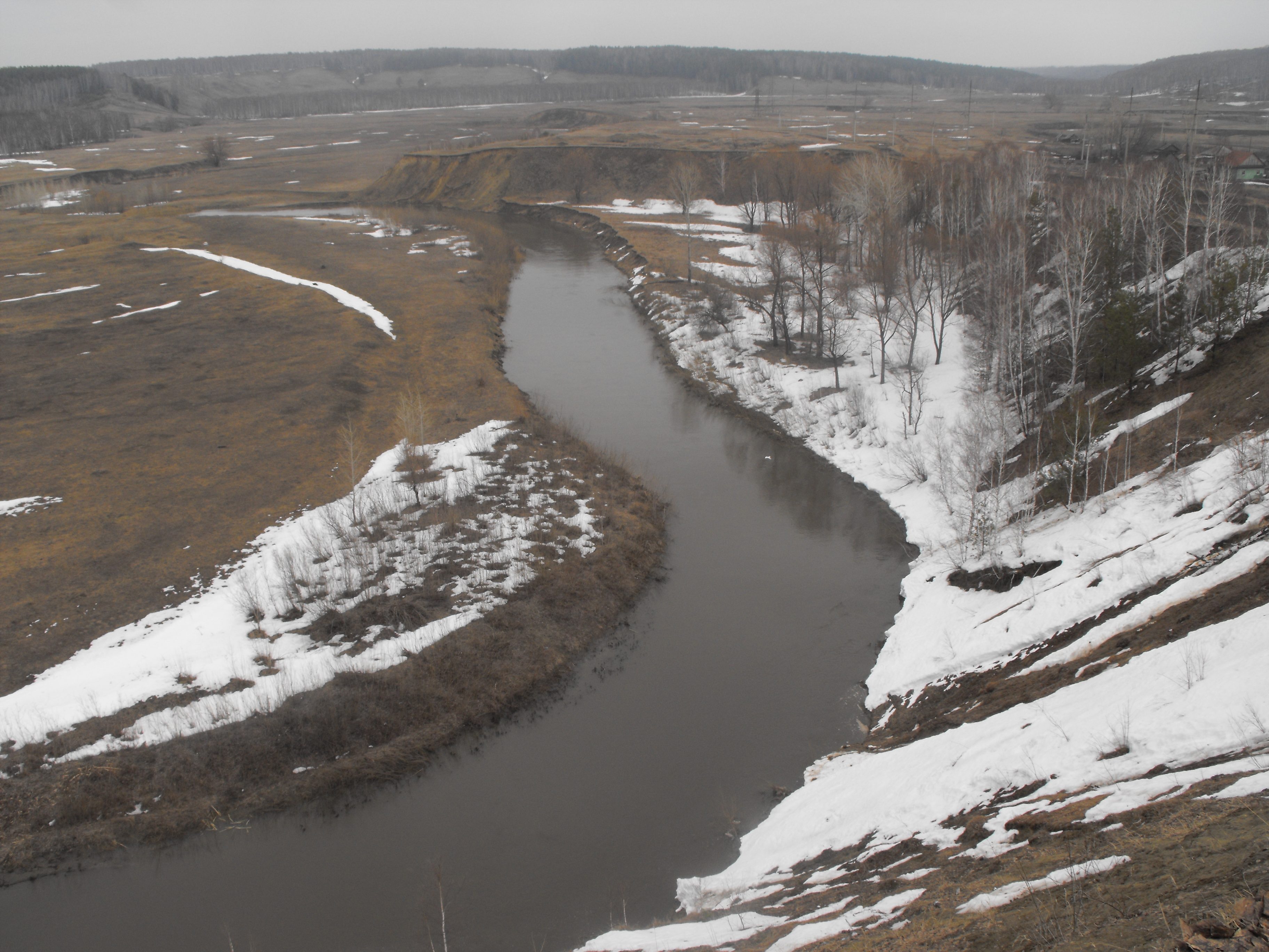 Обрыв. Река Лосиха в селе Косиха